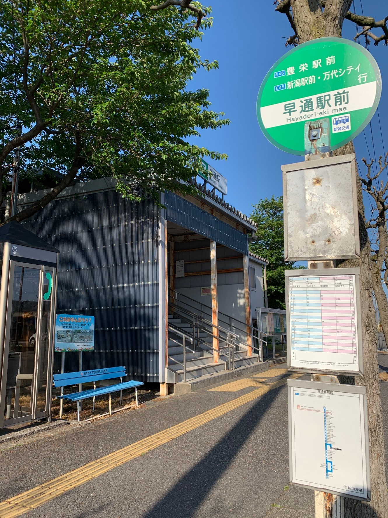 新潟交通 E4 大形線 「早通駅前」バス停（2020年5月）